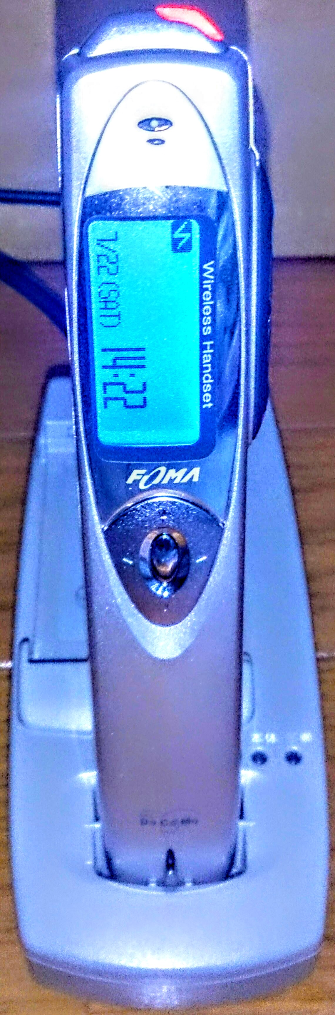 SH2101V・ワイヤレスハンドセット